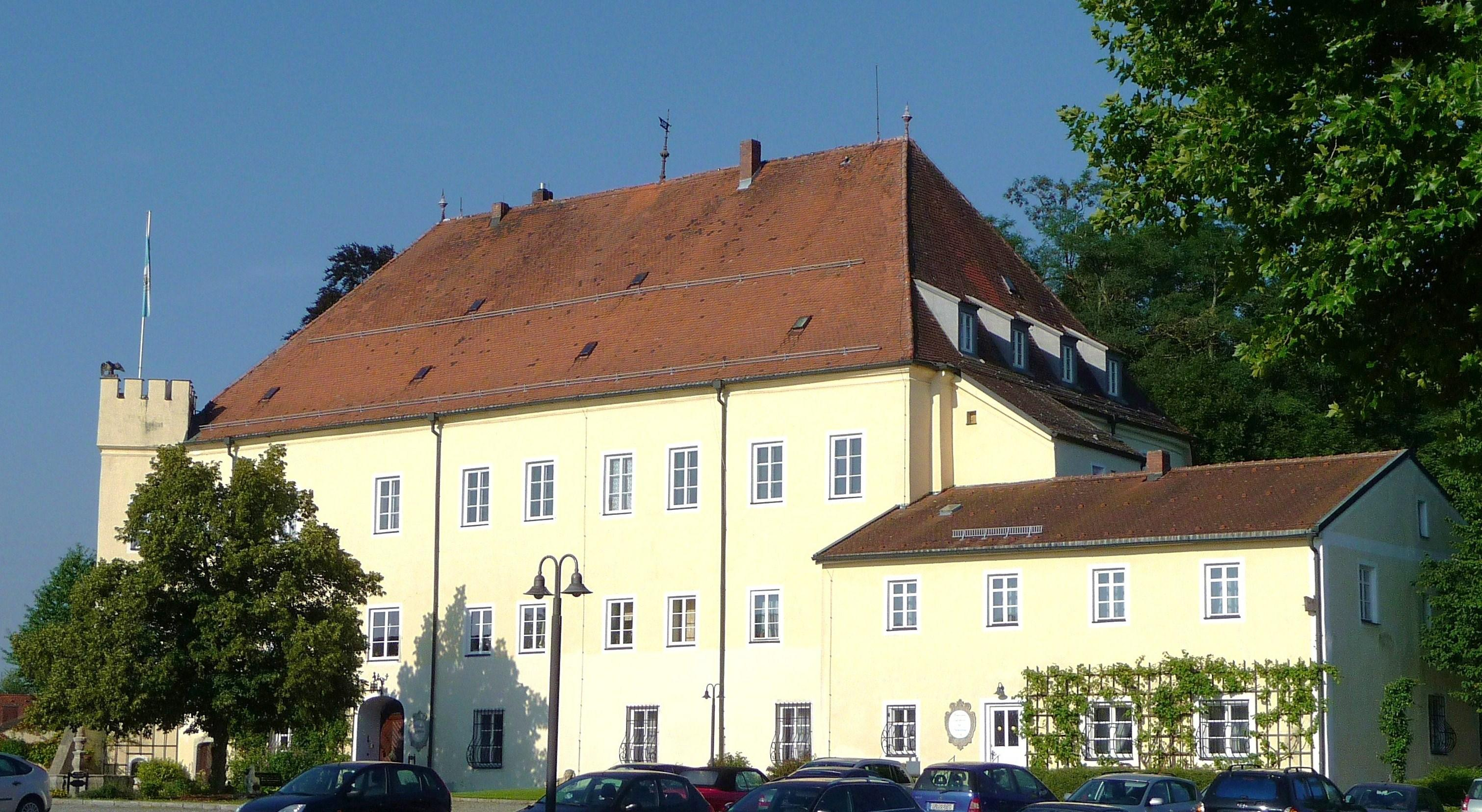 Schloss Steinach Beschreibung des Bayrischen Landesamts für Denkmalpflege: Schloß Steinach, zweigeschossige Anlage mit Polygontürmchen an der Südecke und Schloßkapelle im nördlichen Erdgeschoß, ab 1549 westlich von einem Vorgängerbau errichtet, 1902/08 nach Plänen von Gabriel von Seidl umgebaut; mit Ausstattung; Wirtschaftsgebäude des Schloß- und Betriebshofes: ehem. Roß- und Ochsenstall, erdgeschossiger abgewinkelter Satteldachbau mit böhmischen Gewölben, 1. Hälfte 19. Jh., 1906 erweitert, an der Südseite des Schloßhofes; ehem. Kuhstall (Schweizerei), langgestreckter Satteldachbau, 1906 von Iwan Bartky nach Plänen Gabriel von Seidls errichtet, an der Ostseite des Schloßhofes; ehem. Scheune, gemauerter Satteldachbau mit ursprünglich offenen Erdgeschoßarkaden, 1. Hälfte 19. Jh., an der Nordseite des Betriebshofes.